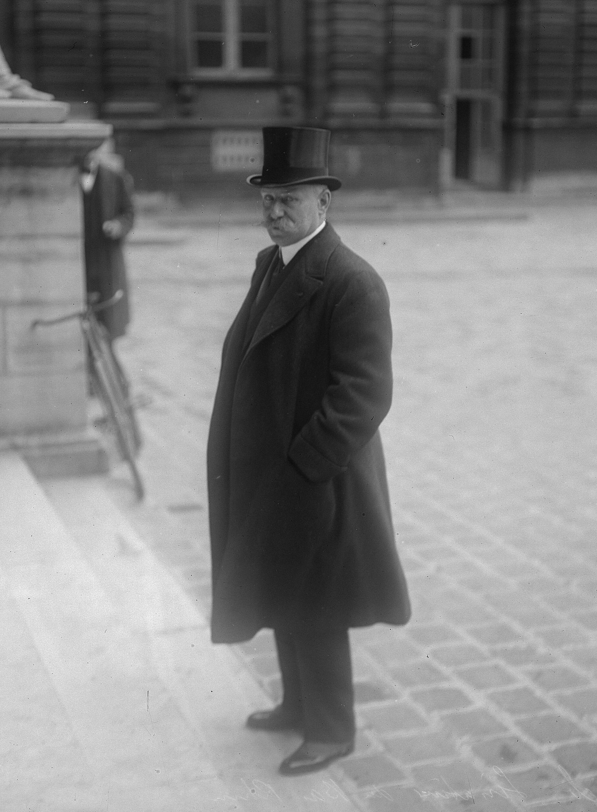 [Le] général [Emile] Taufflieb, sénateur du Bas-Rhin [cour d'honneur du Sénat] : [photographie de presse] . 1920. Bibliothèque nationale de France